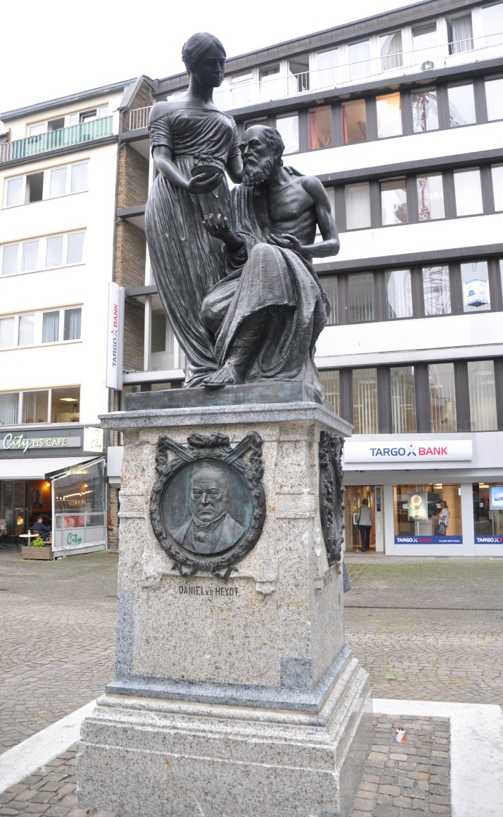 Das Denkmal würdigt das Elberfelder Modell. Es ist eine Rekonstruktion eines Denkmals von 1903. Die acht Tonnen schwere Statue zeigt eine Frau, die ihren Arm fürsorglich um einen alten Mann gelegt hat, dem sie etwas zu Essen reicht.